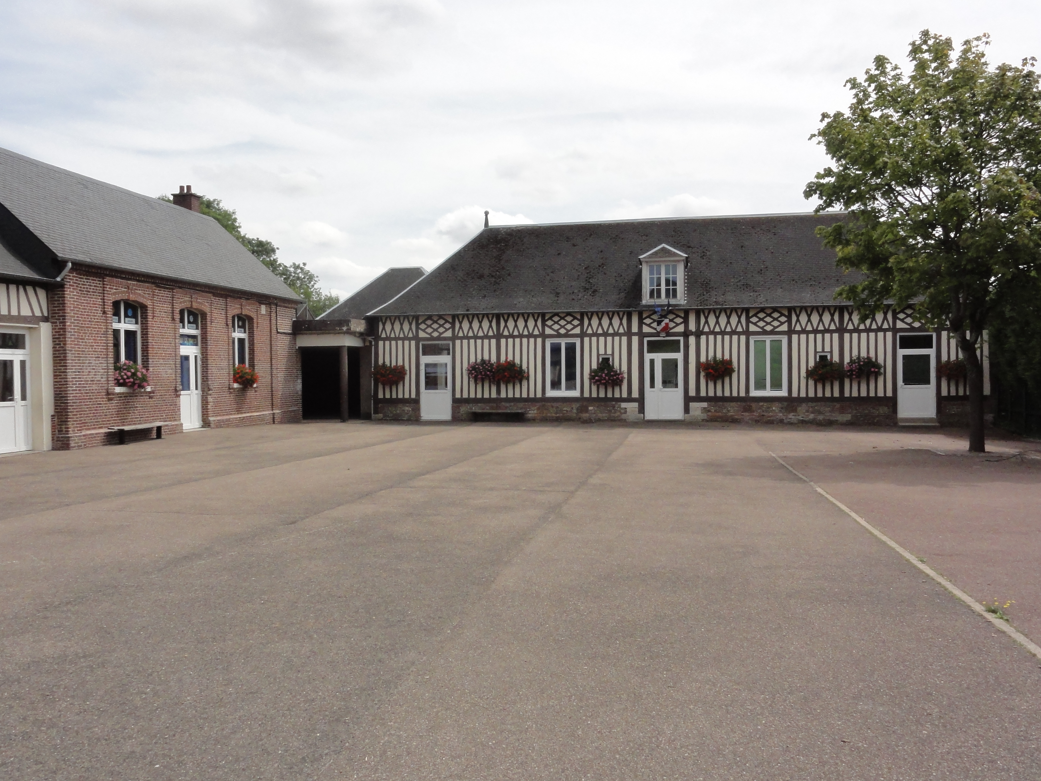 Autretot (Seine-Mar.) école